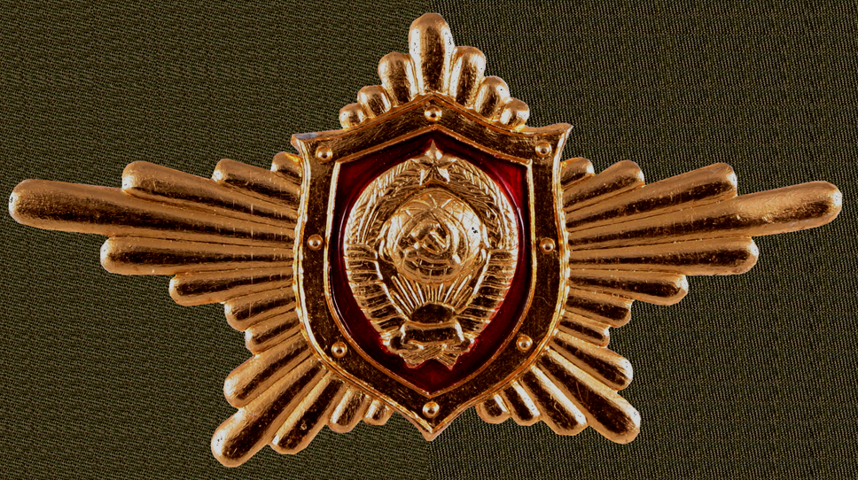 знаки ОРПК